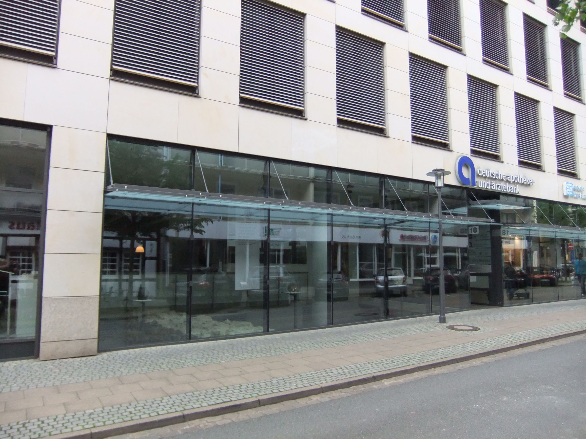 Ausstellungsraum und Neubau.